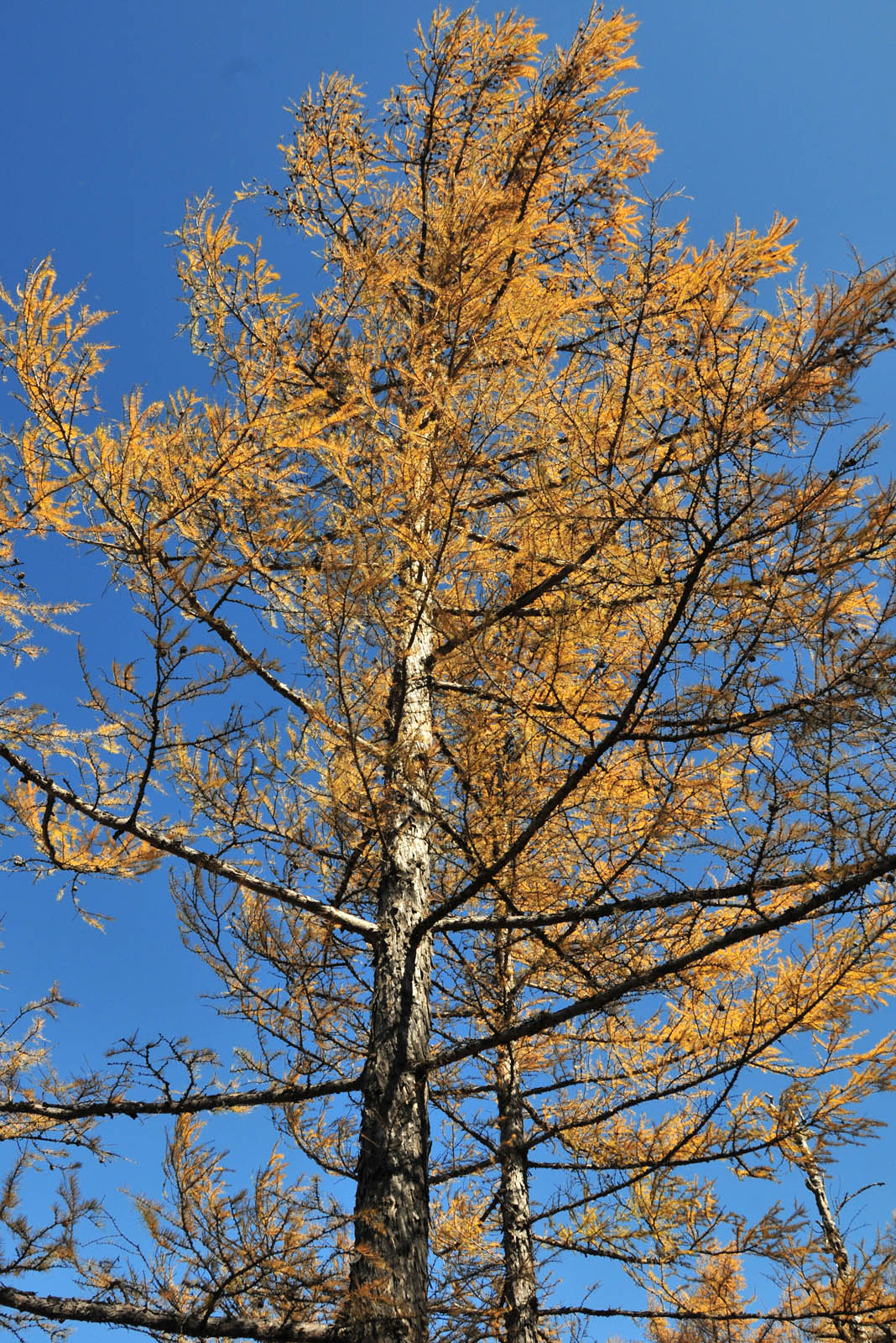 Larix gmelinii, Aershan (Arxan), Inner Mongolia; approx 47°N 120°E.